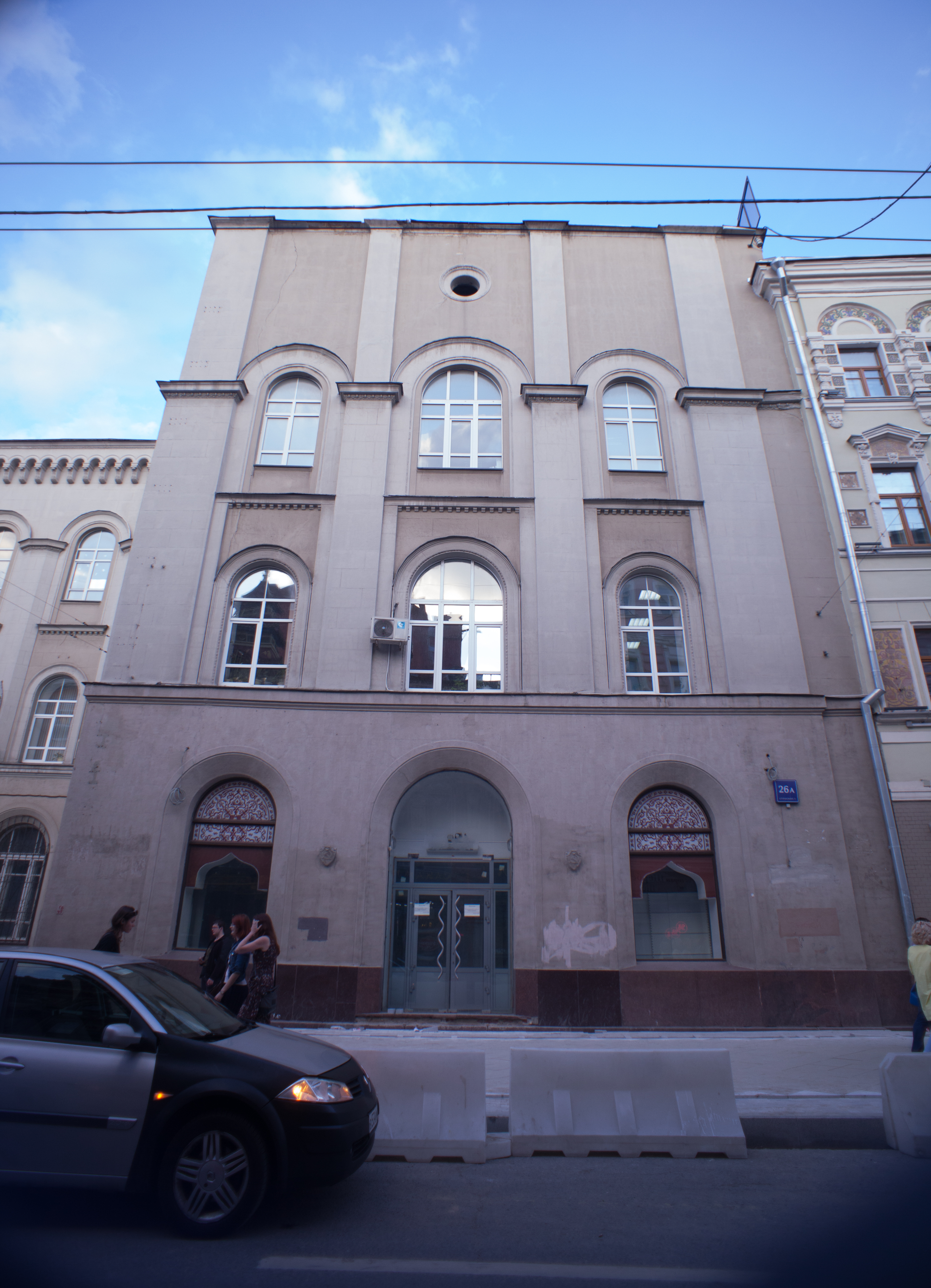 Здание архива почтамта с жилыми помещениями — административное здание (1855—1856, архитектор А. К. Кавос